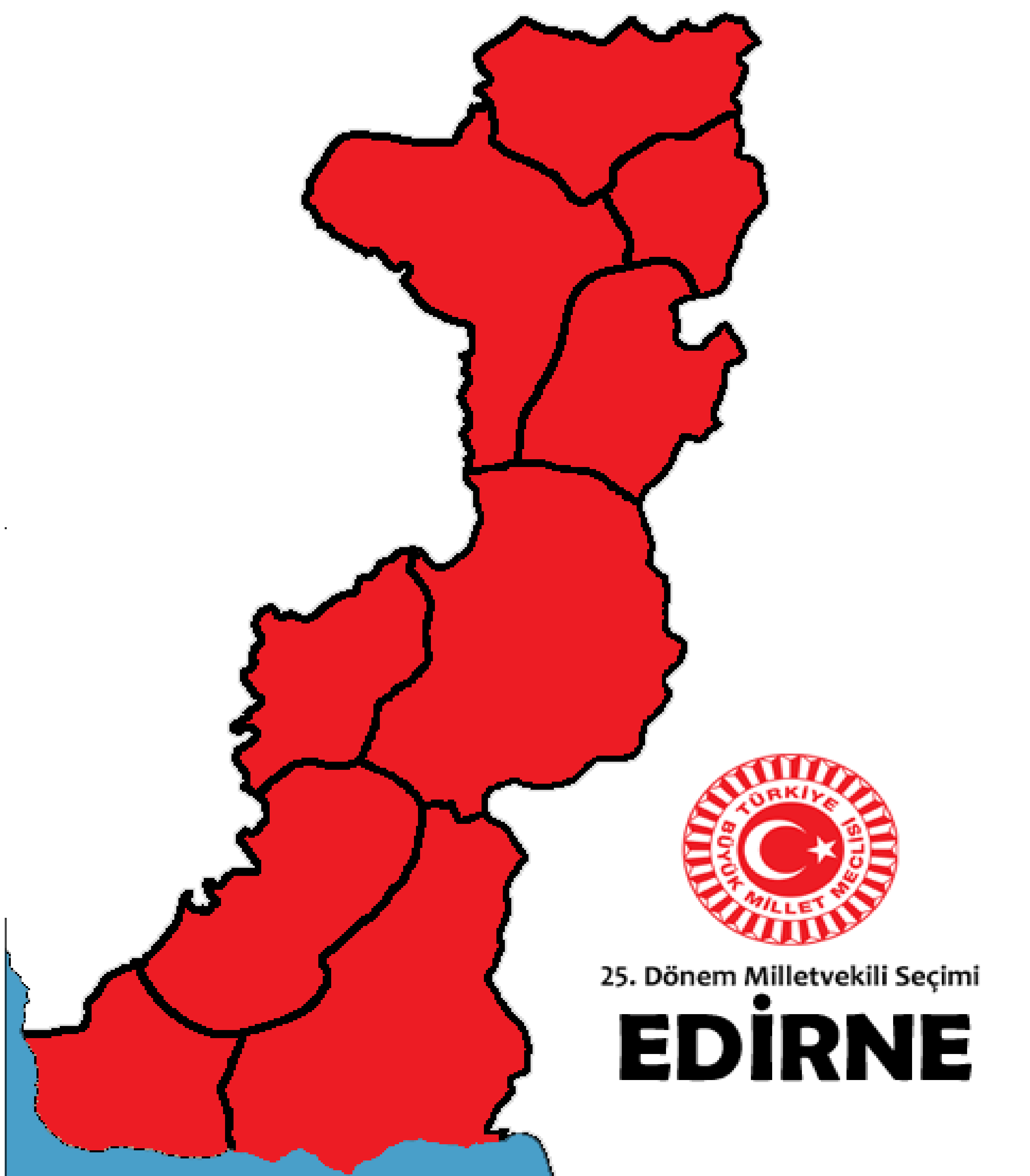 2015 genel seçim sonuçları